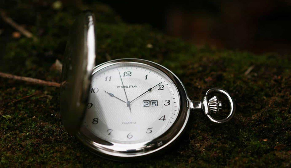 ساعت مچی ماشین‌حساب کاسیو مدل C-801